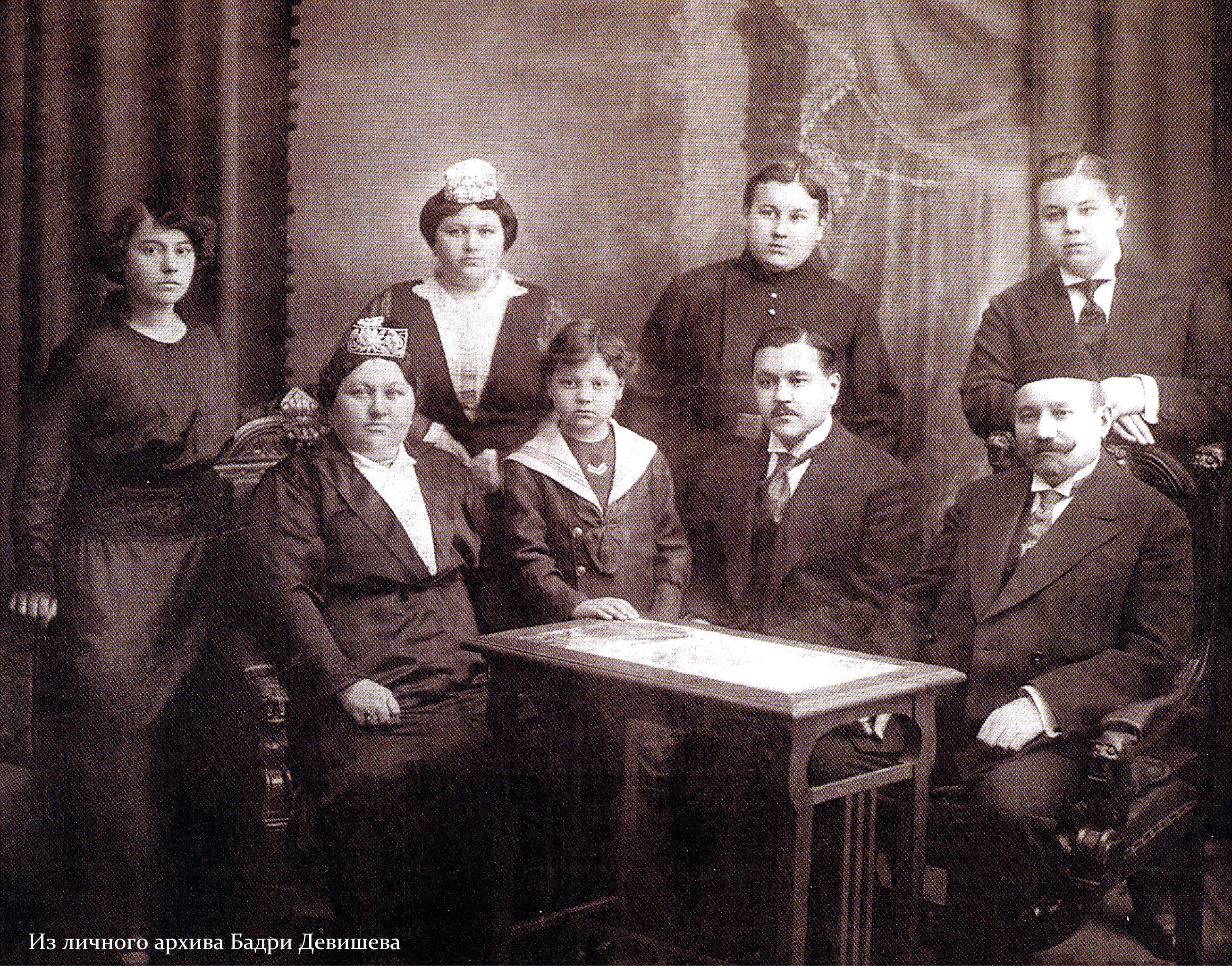 Семья Зайнетдина Агафурова (слева направо): сидят - Асьма Садыковна, Искандер, Нуритдин, Зайнетдин. Стоят - Марьям, Магира, Бурхан, Билял